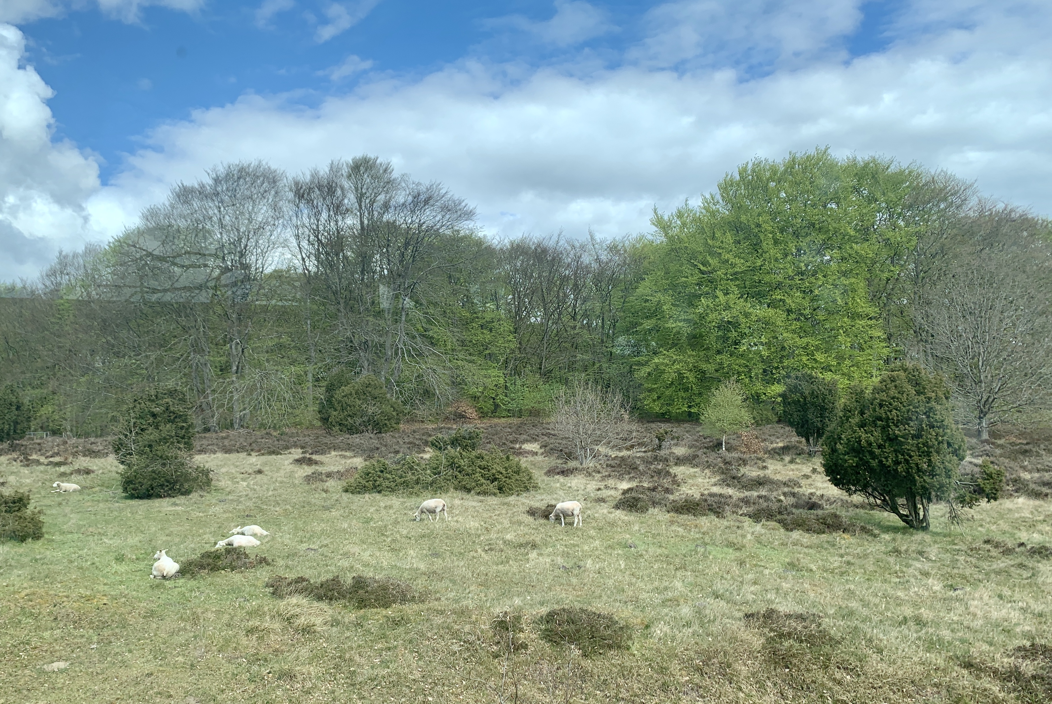 Linddalene set fra heden